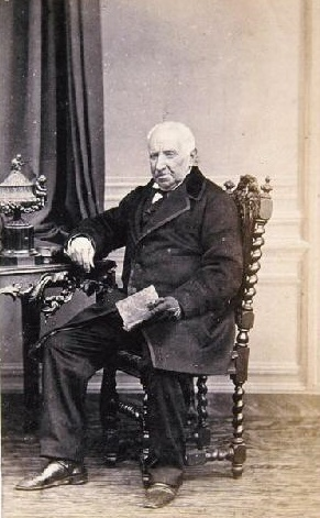 Juan Manuel Ballesteros, fotografía de J. Laurent. Museo de Historia de Madrid